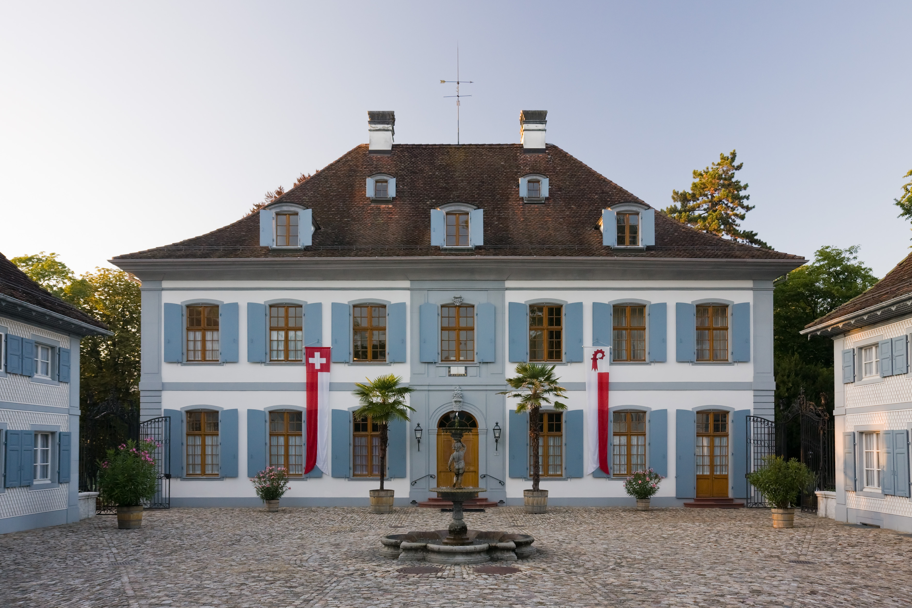 Schloss Ebenrain bei einbrechender Dämmerung